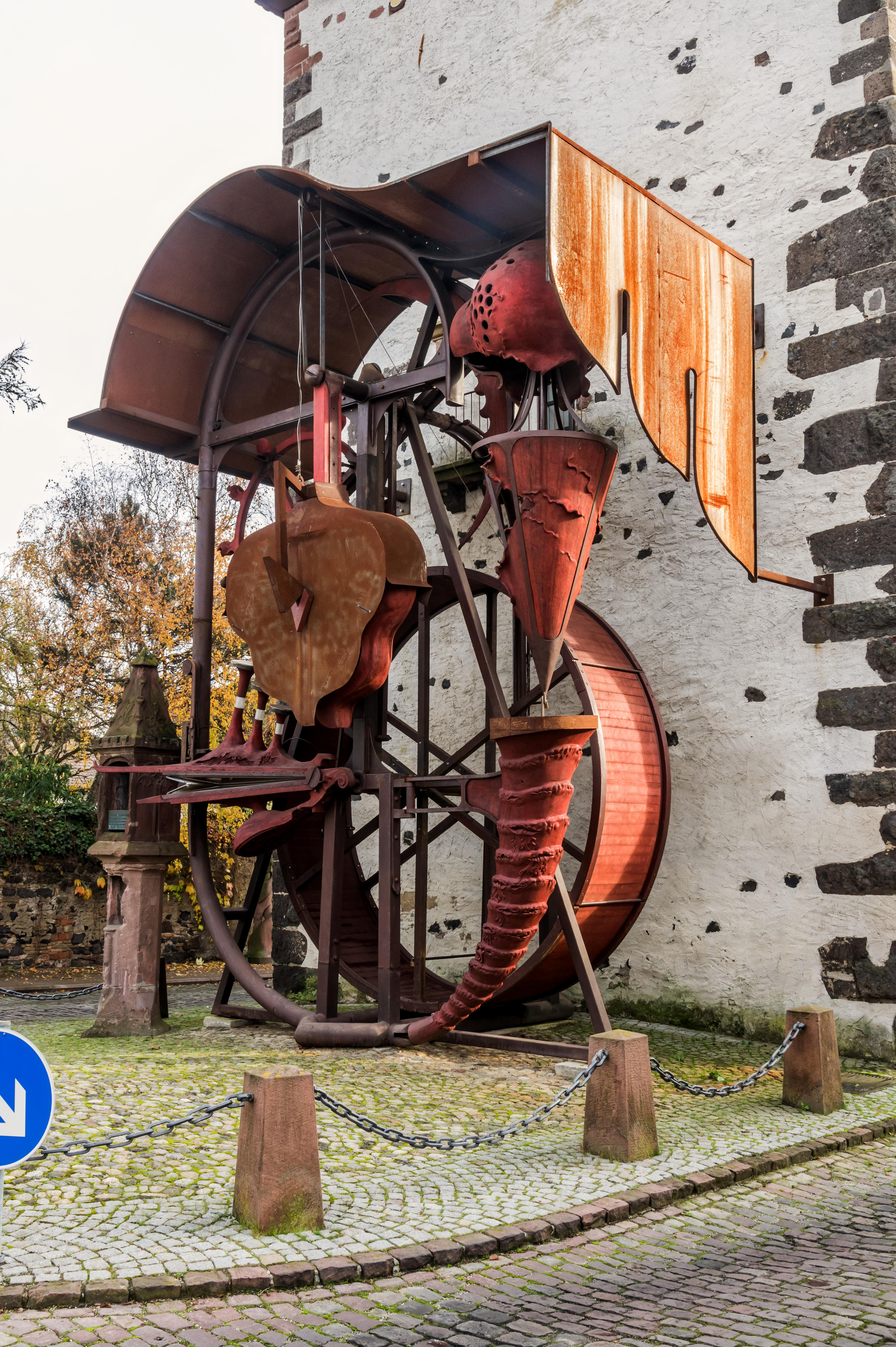 Bilder aus Breisach am Rhein Der Münsterberg Das Kunstwerk Die Radbühne, geschaffen vom Breisacher Künstler Helmut Lutz wurde im Herbst 2012 durch die Stadt Breisach hier am Radbrunnenturm aufgestellt.